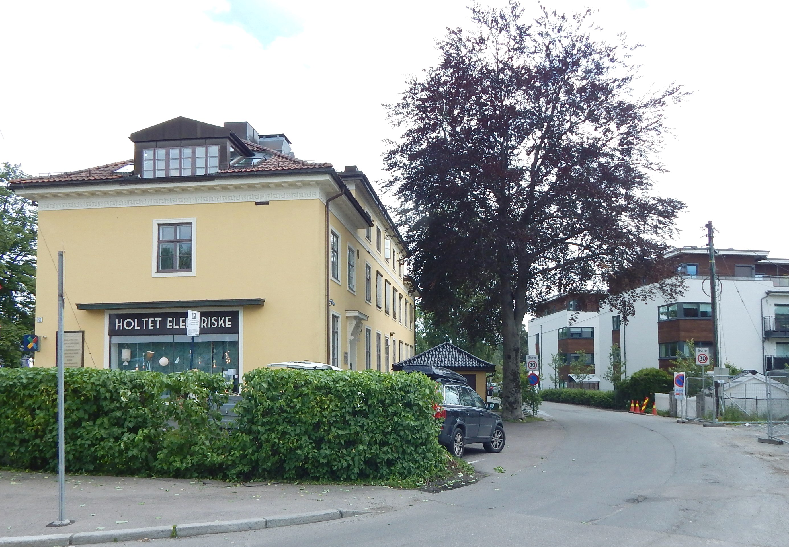 Holtveien sett fra Kongsveien